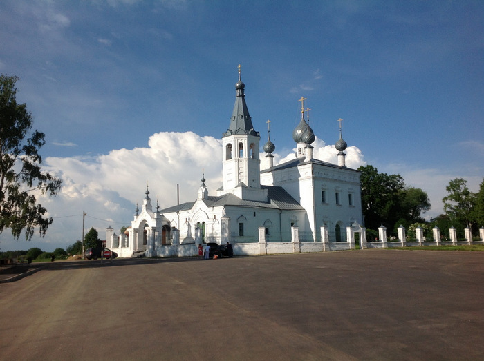 подворье Никольского монастыря в Годеново.